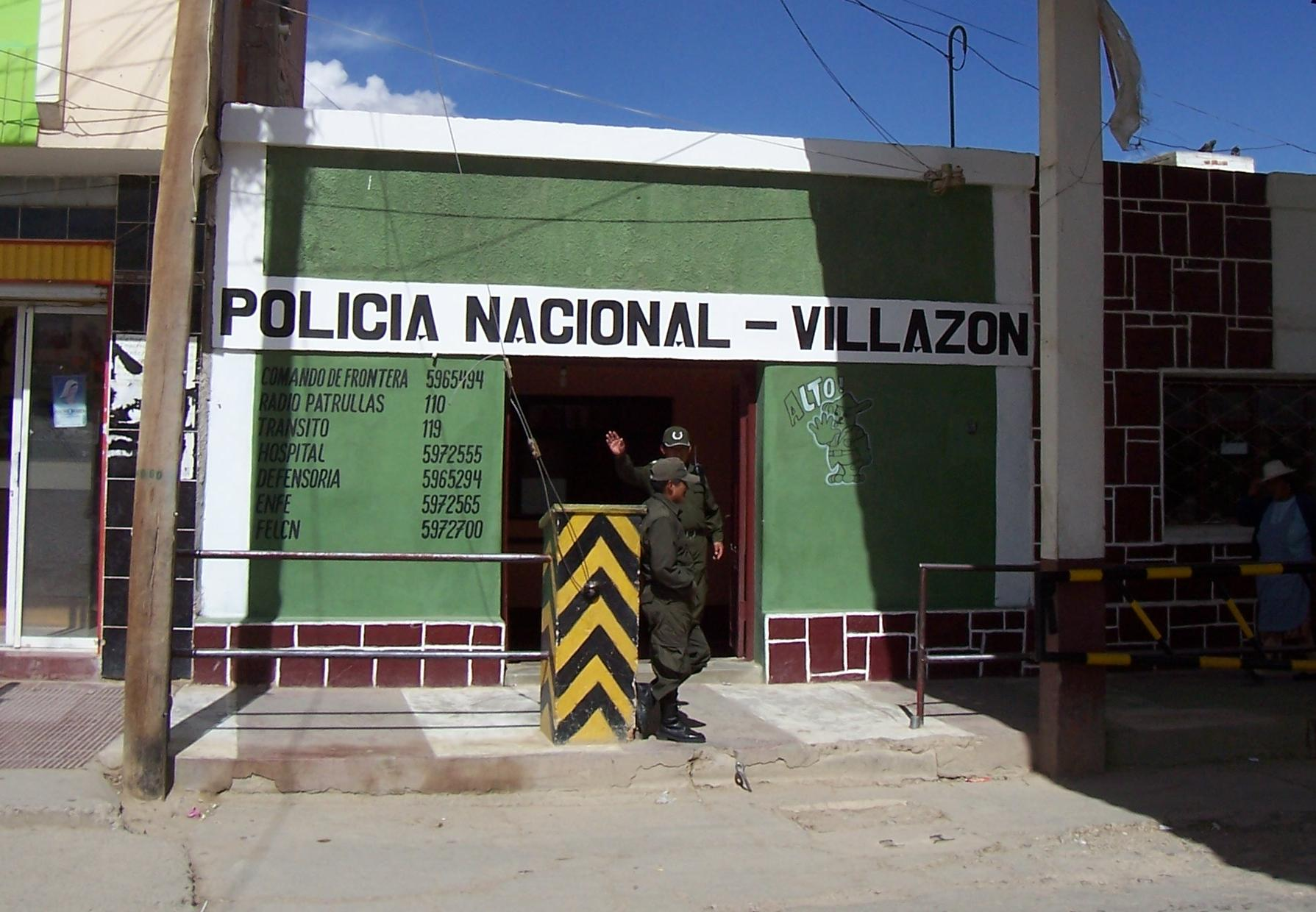 Policía Nacional de Bolivia custodiando el Paso Internacional Villazón (Bolivia) - La Quiaca (Argentina).